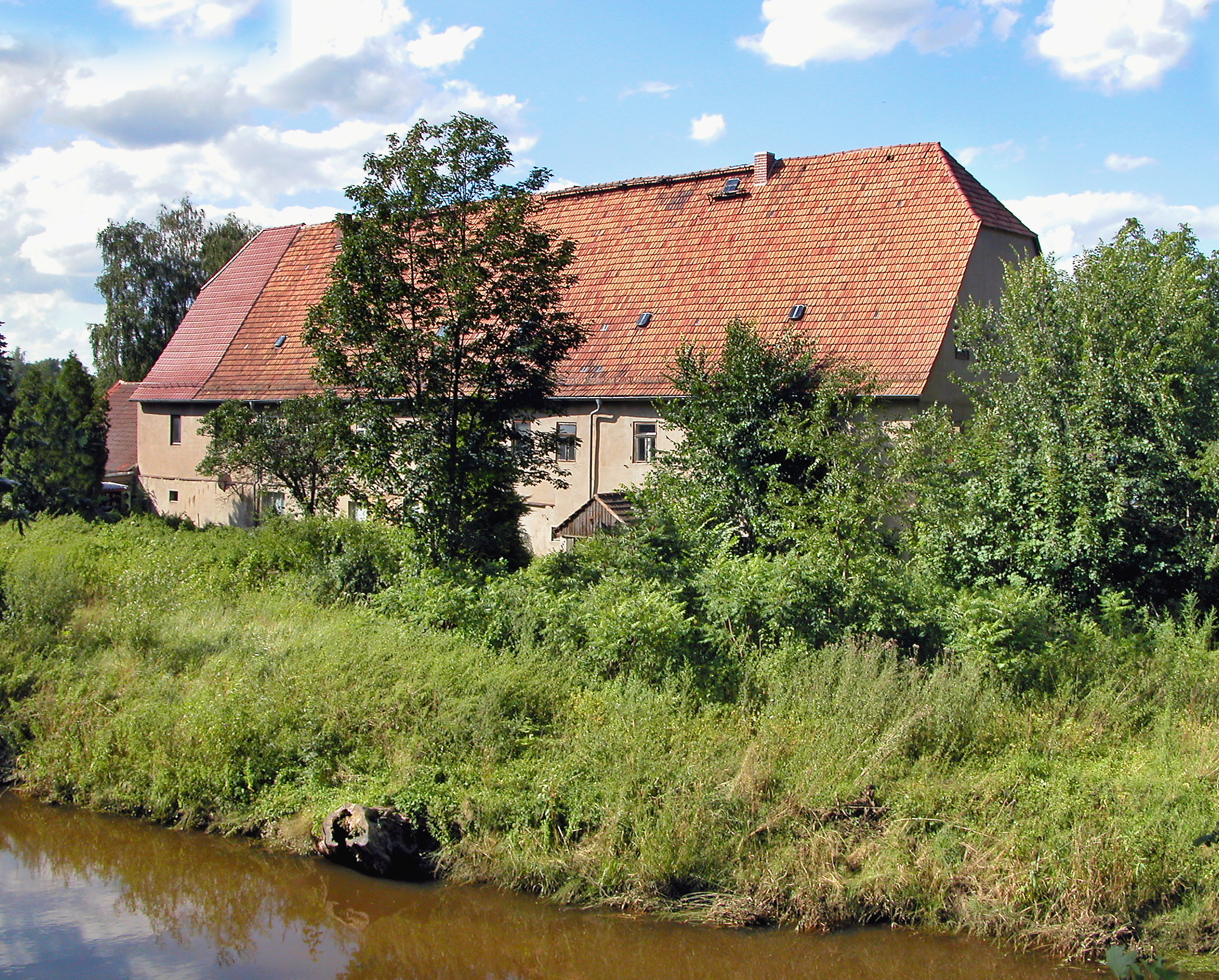 09.07.2012 01471 Großdittmannsdorf (Radeburg), Bodener Straße 1: Das Rittergut Boden liegt an der Großen Röder etwas außerhalb des eigentlichen Ortsteils Boden. Der Hof ist 1465 als "forwerk zum Boden" bezeugt. Der letzte Rittergutsbesitzer war Dr. Walther Große. Mit der Bodenreform wurde das Rittergut aufgeteilt und im Herrenhaus Wohnungen eingerichtet. Hier der Blick über die Große Röder zum Herrenhaus (GMP: 51.206107,13.764155). [DSCNn4334.TIF]20120709340DRJ.PG(c)Blobelt